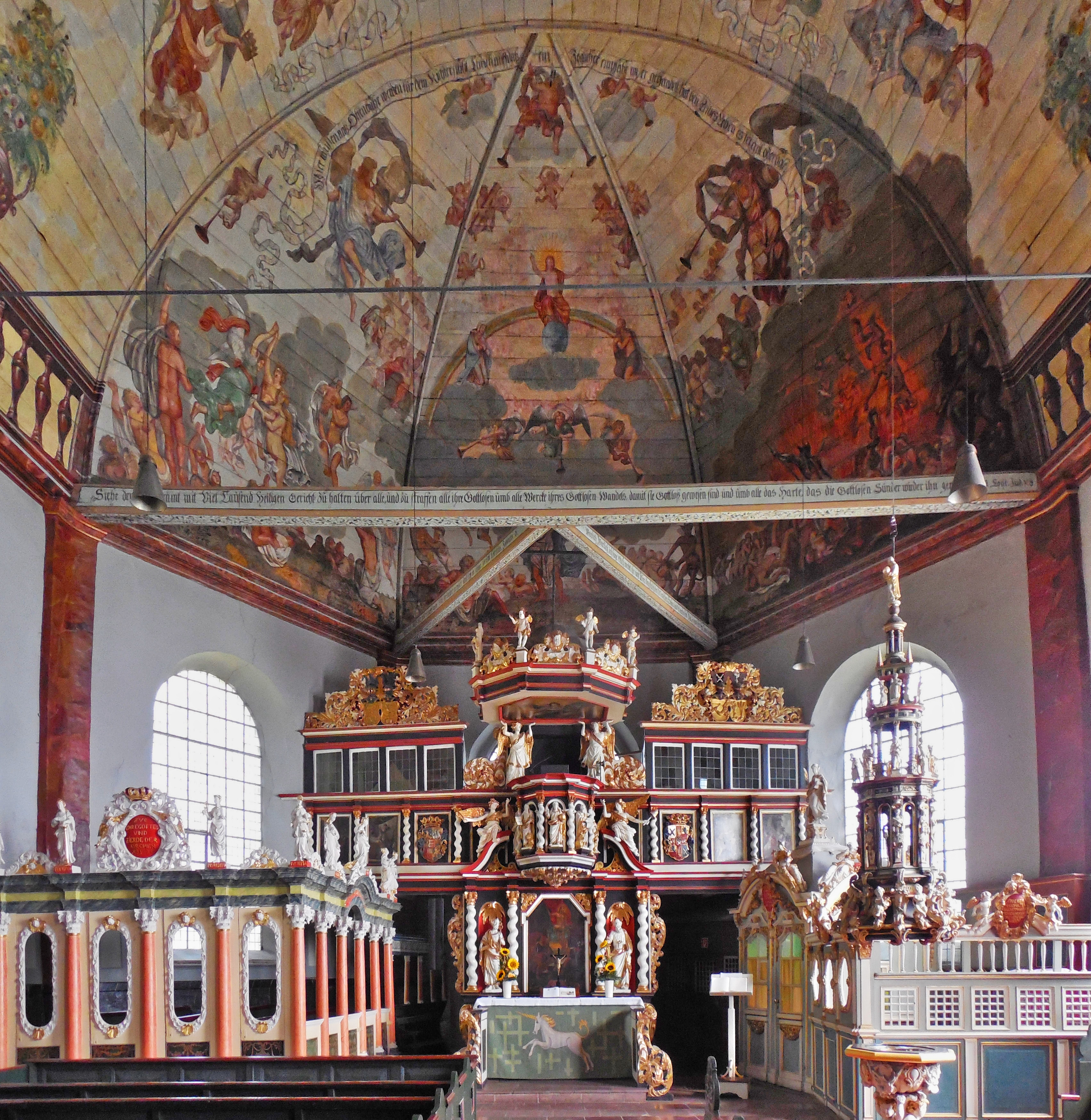 Organistenweg, 21129 Hamburg, Germany